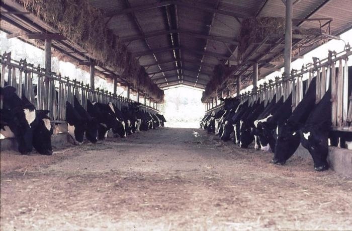 גן-שמואל 1974 - ברפת החדשה